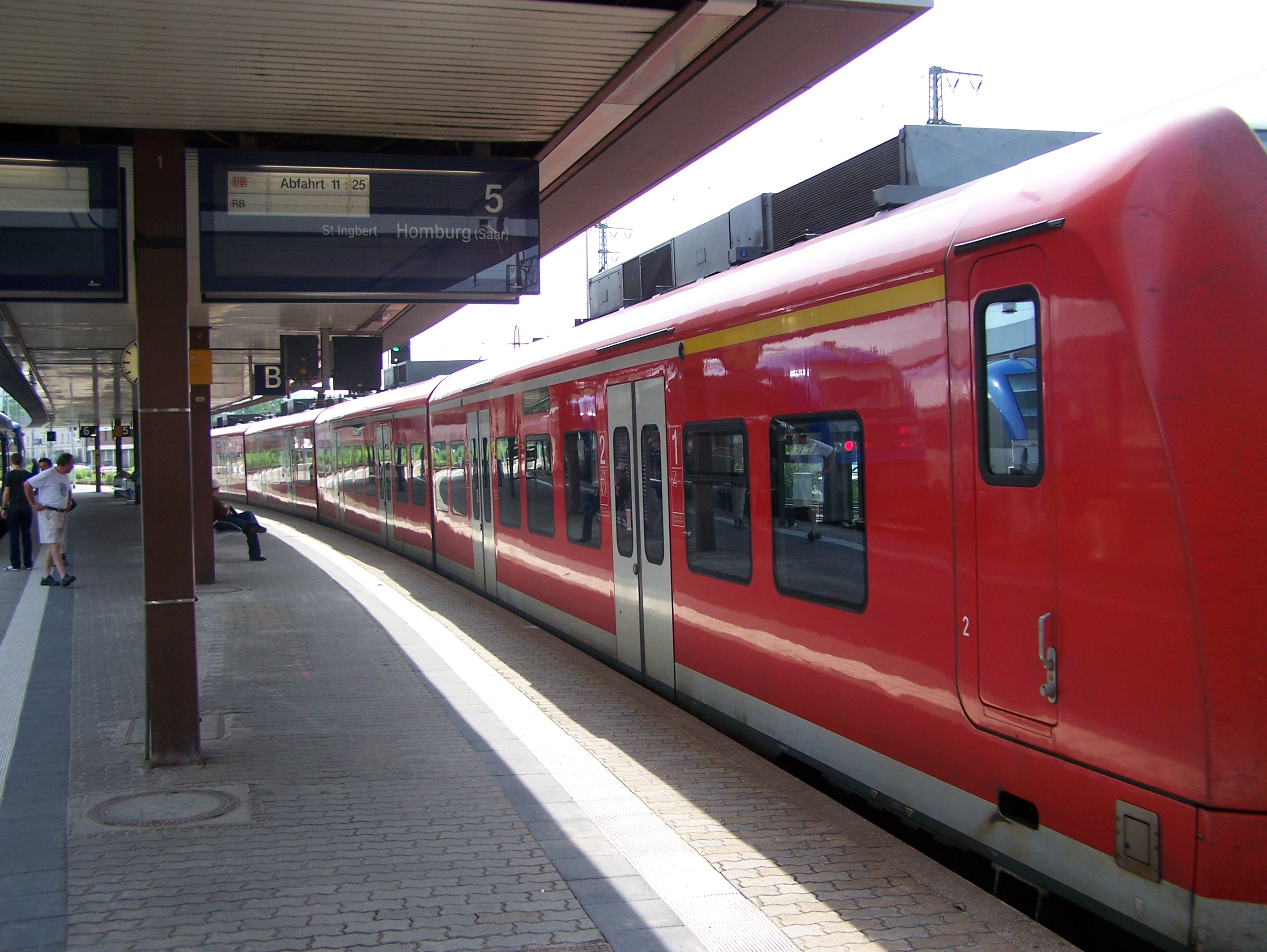 Zug der Baureihe 425 auf Gleis 5 im Saarbrücker Hauptbahnhof (RB nach Homburg)